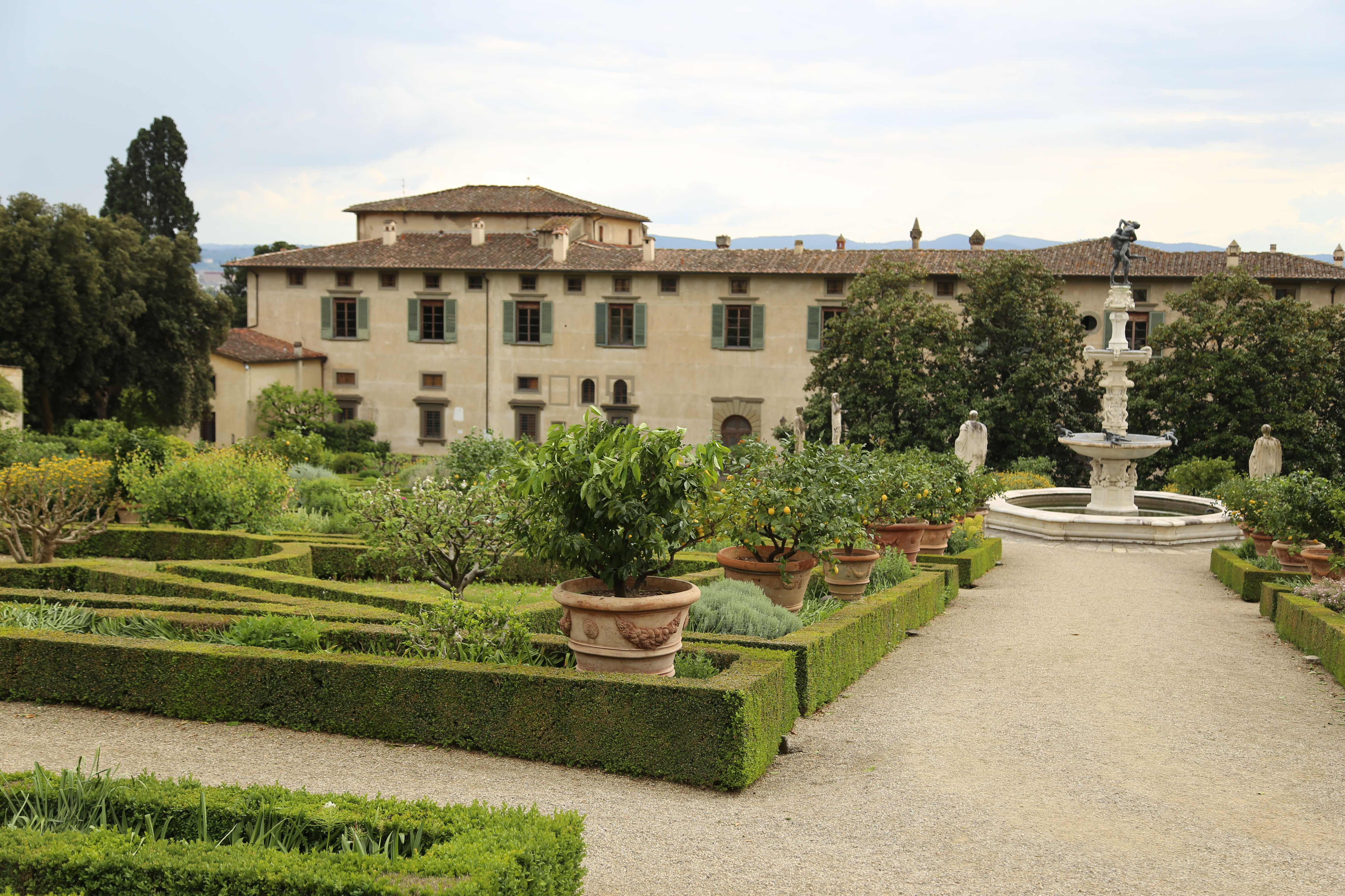 Giardino